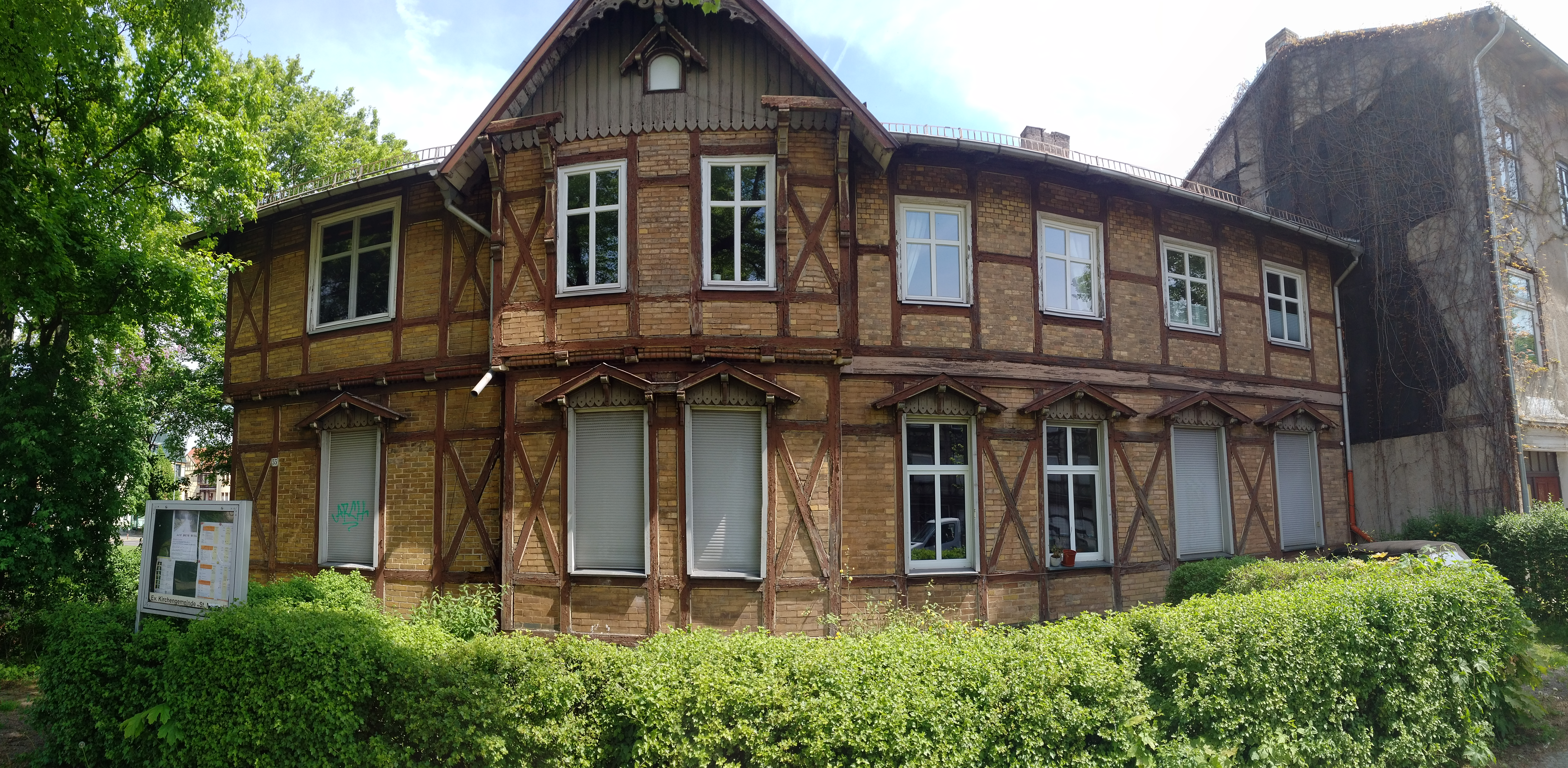 Ansicht von der Leipziger Str. 55